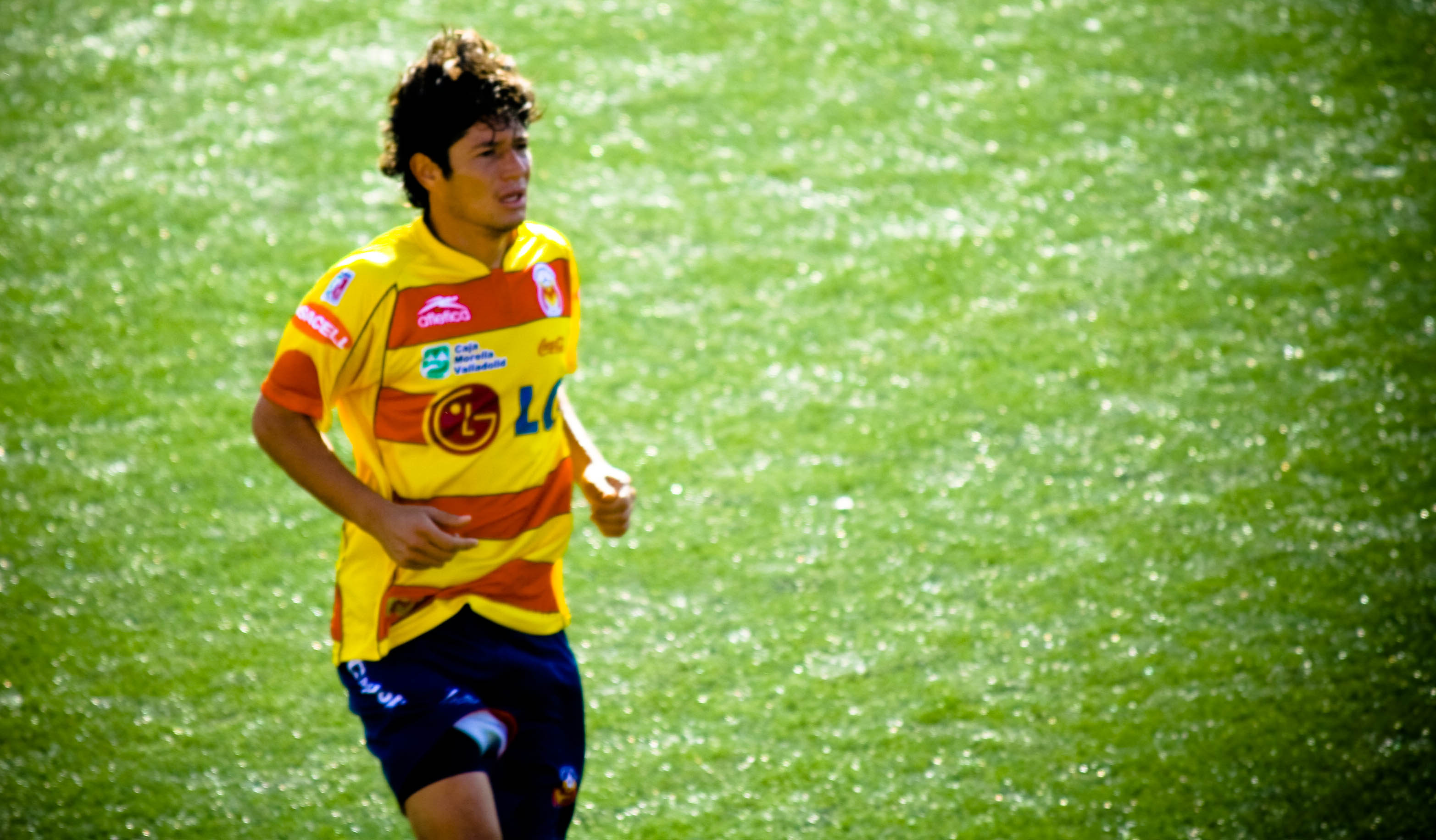 Morelia player Fernando Sslazar